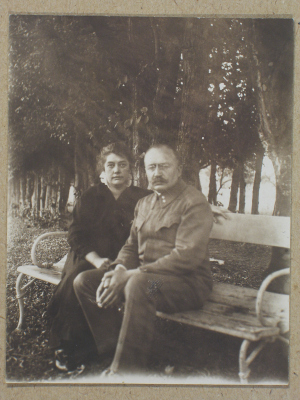 Осип Маковей з дружиною Ольгою Кордубою. Фото, орієнтовно початок 20-х рр. ХХ ст. Інститут літератури ім. Т. Г. Шевченка НАНУ, відділ рукописних фондів і текстології. – Ф. 59. – № 2573.